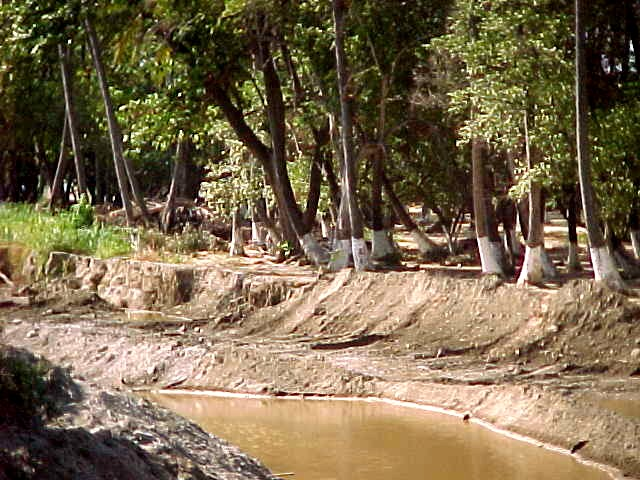 Río Mamo en Catia La Mar, estado Vargas - Venezuela a un año de del deslave de diciembre de 1999 (2000)